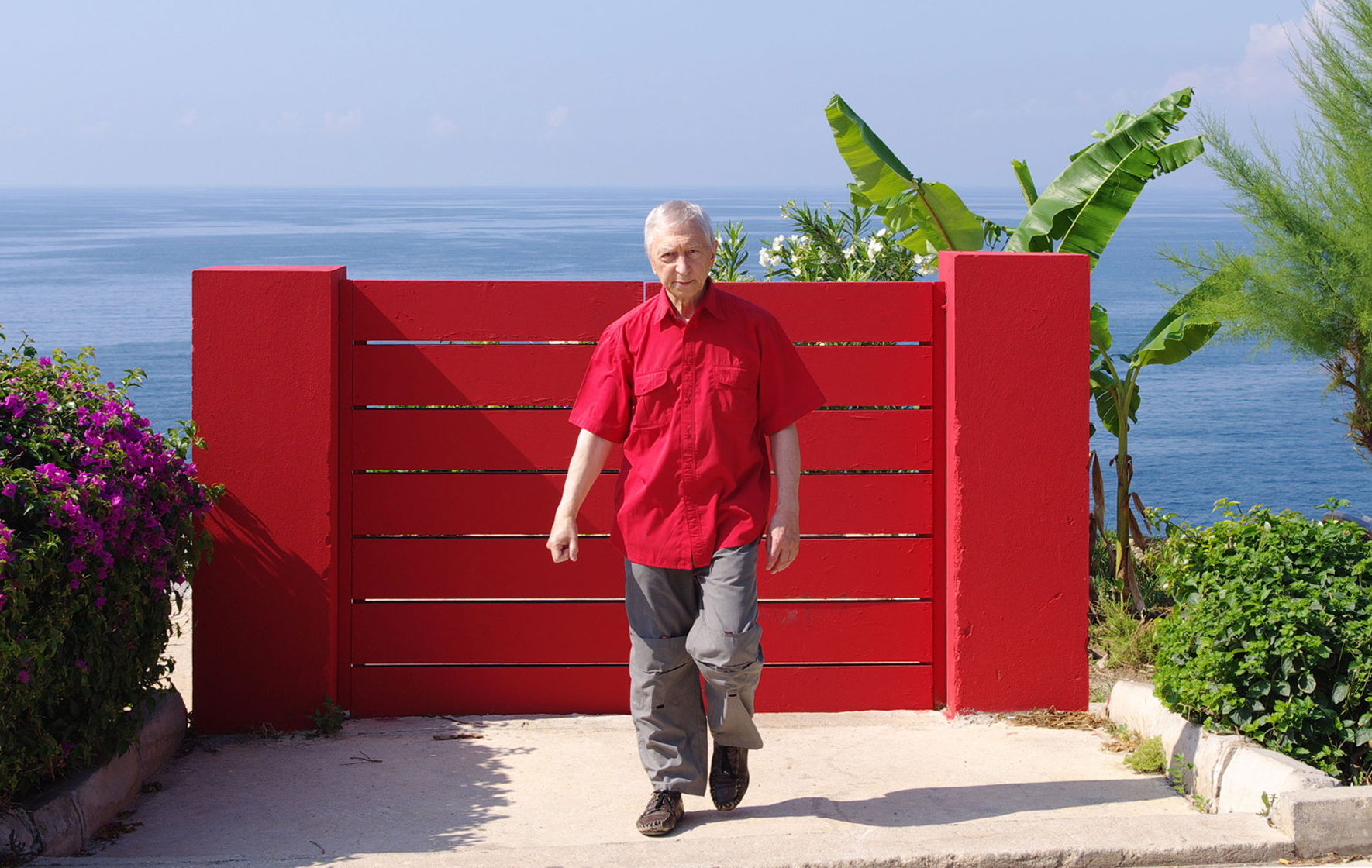 Jerzy Olek Antalya 2011